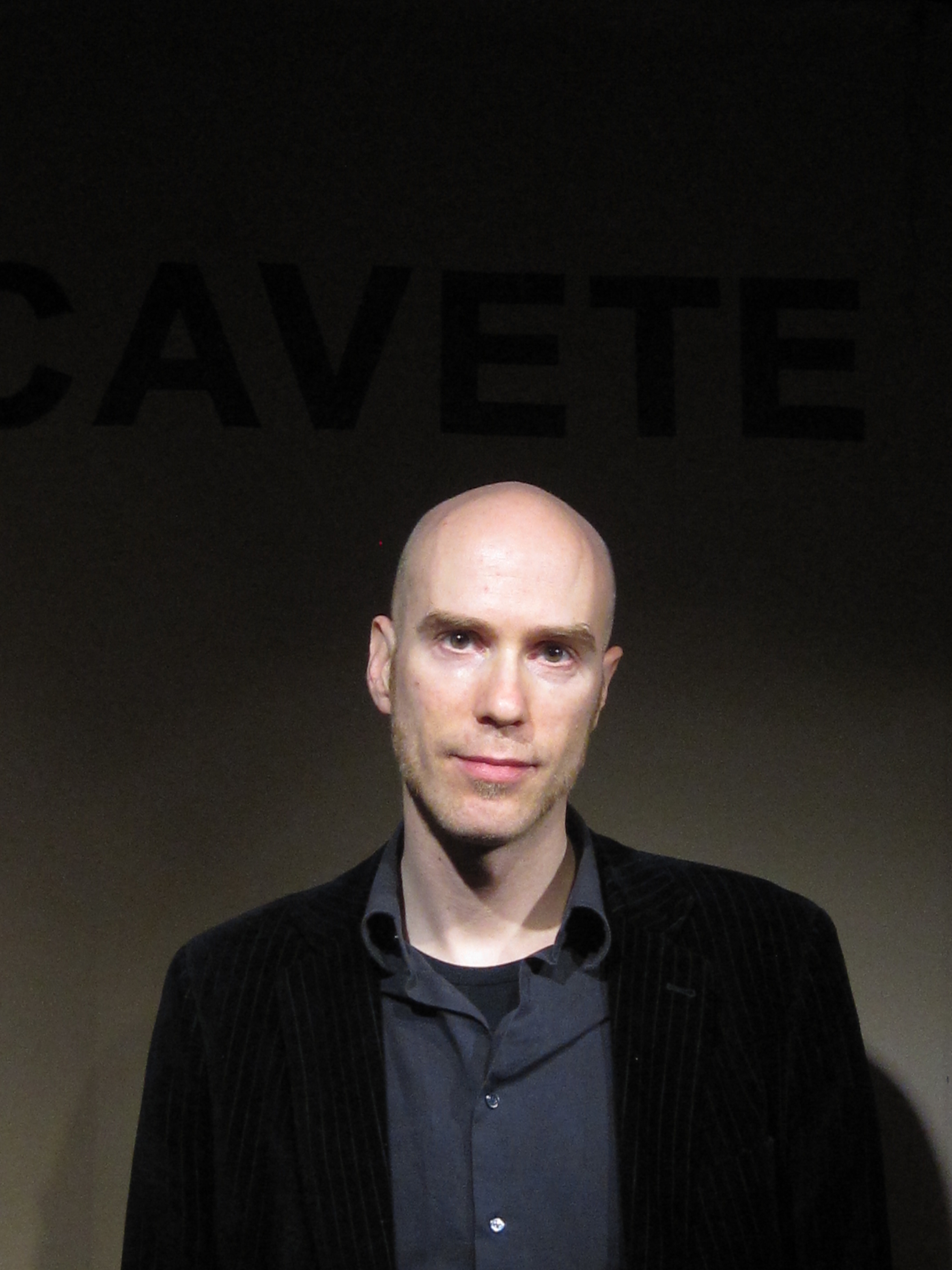 Porträtaufnahme des Jazz-Schlagzeugers Bastian Jütte im Jazzclub Cavete Marburg 2017